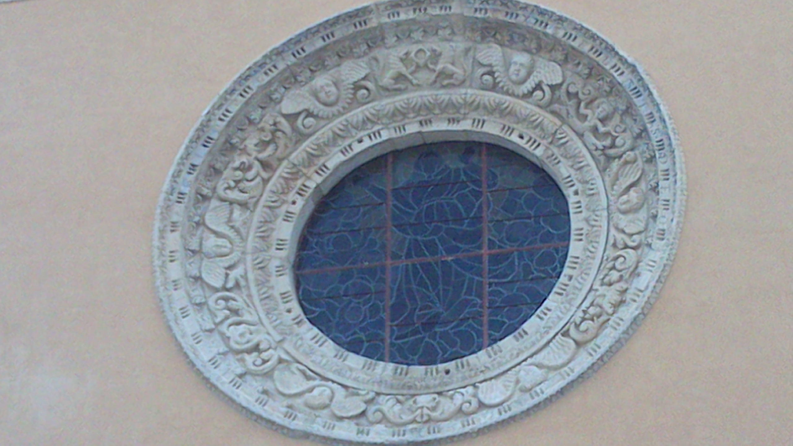 Rosone sulla facciata della chiesa di Santa Maria Assunta a San Pietro Vernotico (BR)